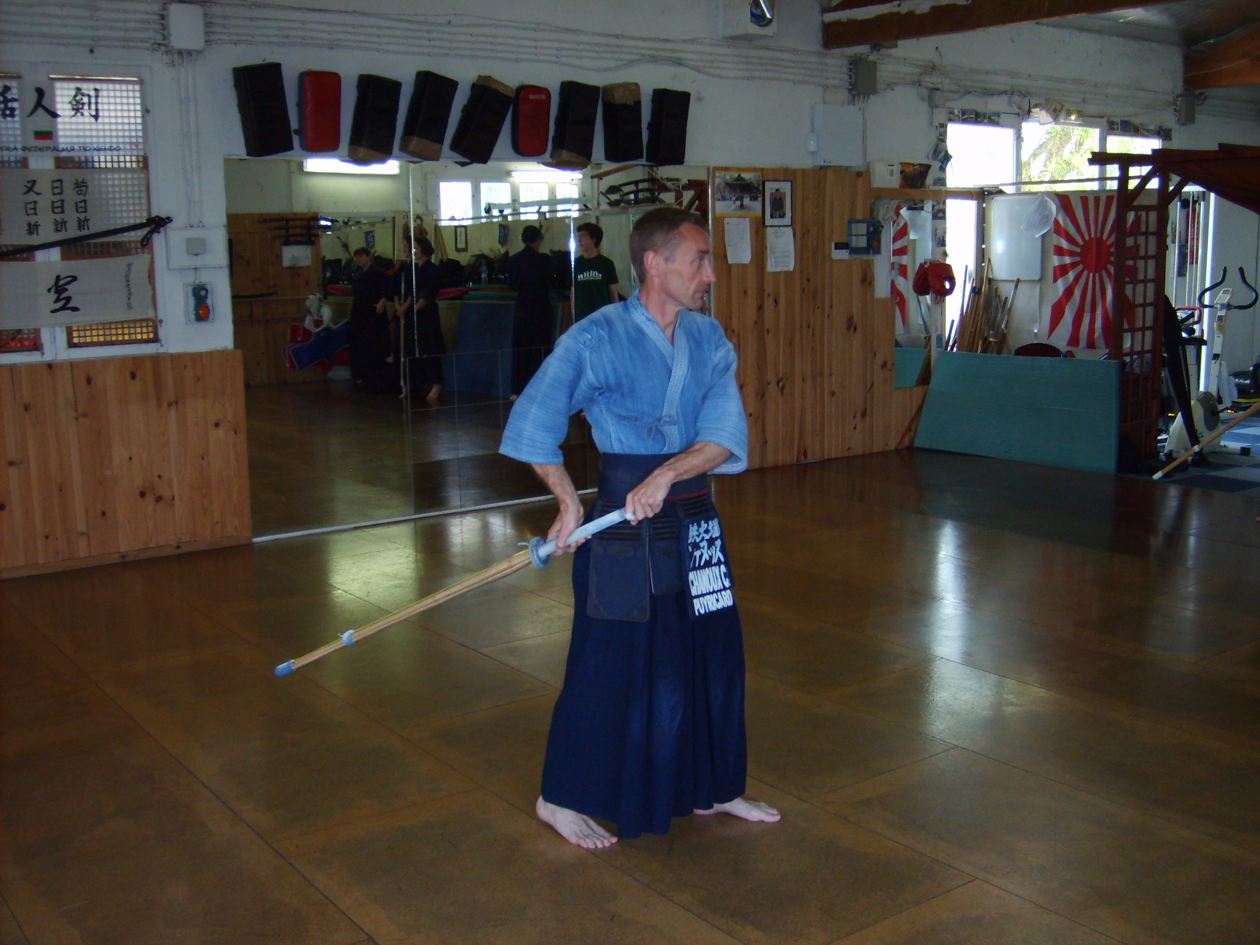 Christophe Chanoux du Dojo Tekkaba à Aix en Provence ( Garde Waki